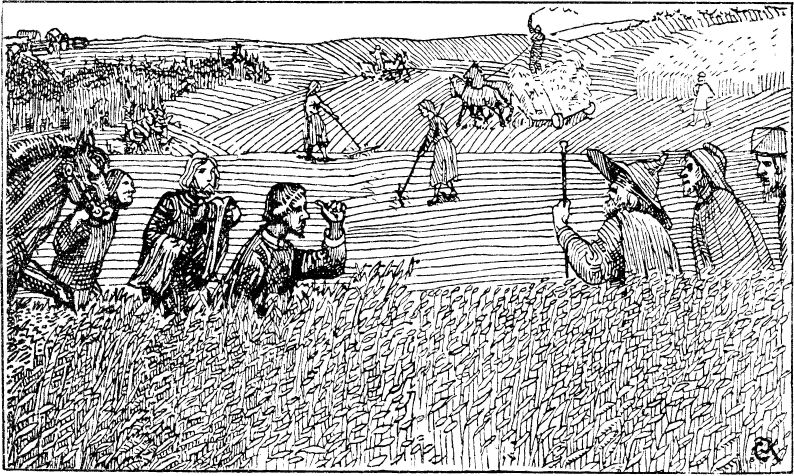 Christian Krohg: Illustration for Olav den helliges saga, Heimskringla 1899-edition. nn: «Sendemennene frå Åsta kjem til Sigurd Syr ute på åkeren.» nb: «Åstas sendebud kommer til Sigurd Syr på åkeren.»